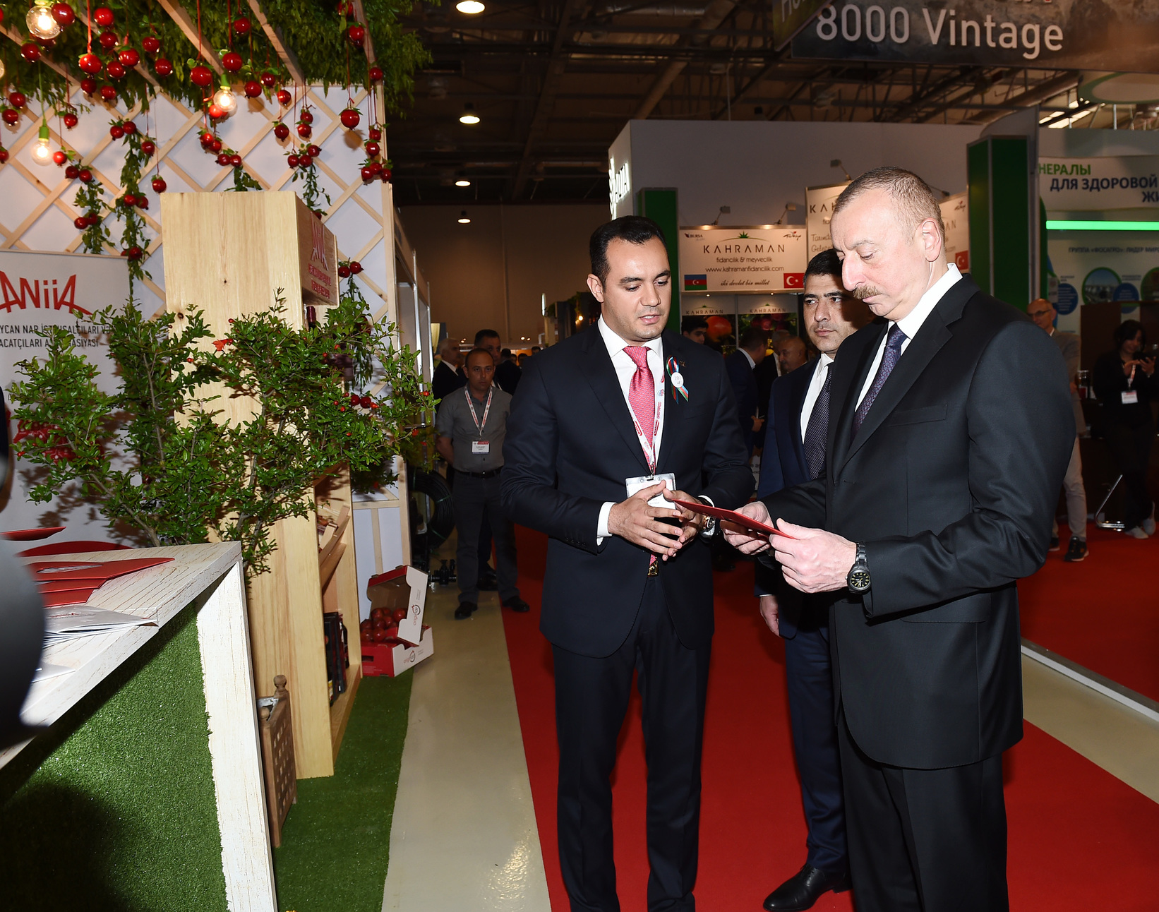 İlham Əliyev XXIV Azərbaycan Beynəlxalq Qida Sənayesi və XII Azərbaycan Beynəlxalq Kənd Təsərrüfatı sərgilərində